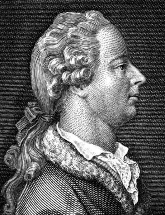 Incisione raffigurante Pietro Verri